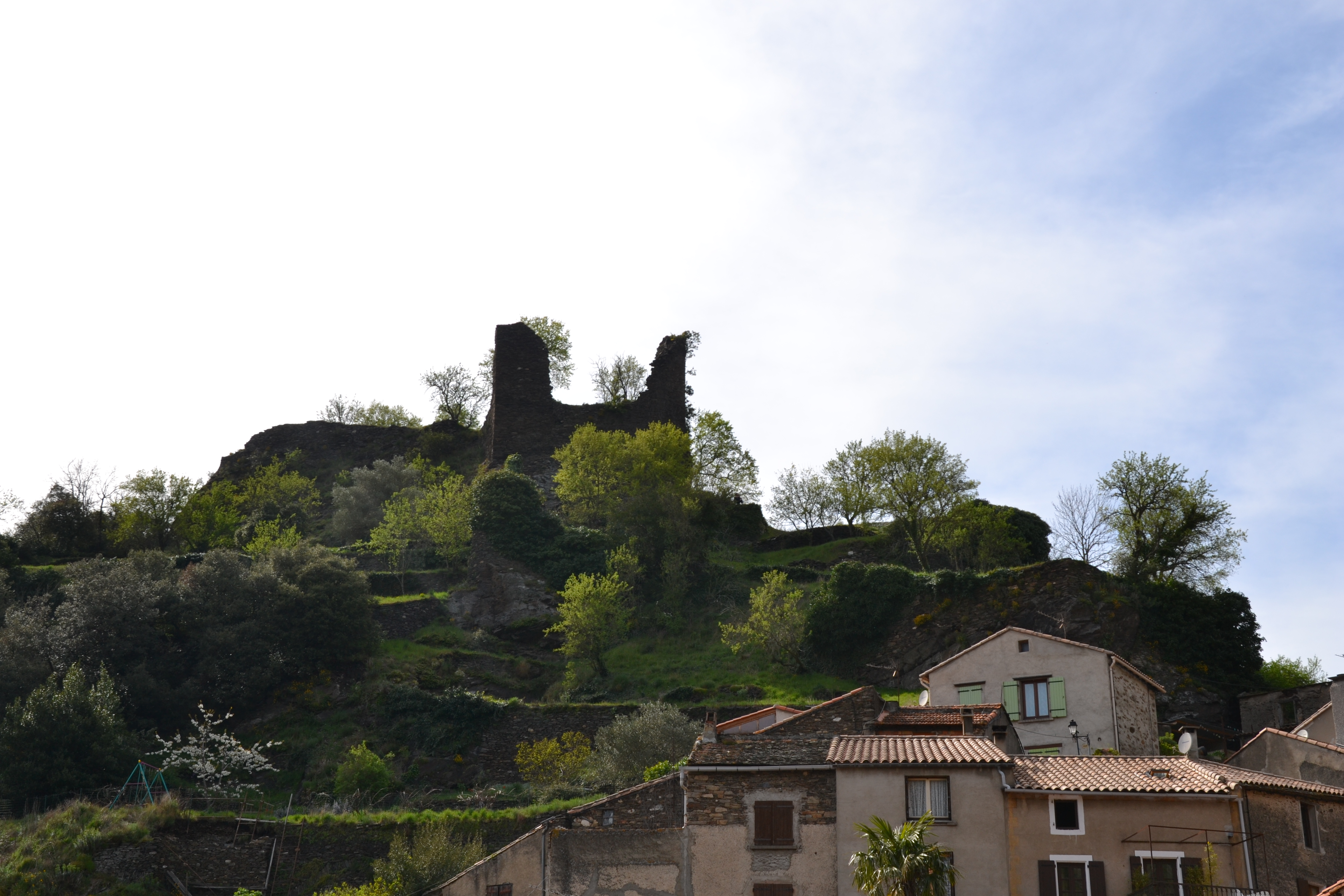 Castrum en ruine du Mas-Cabardès